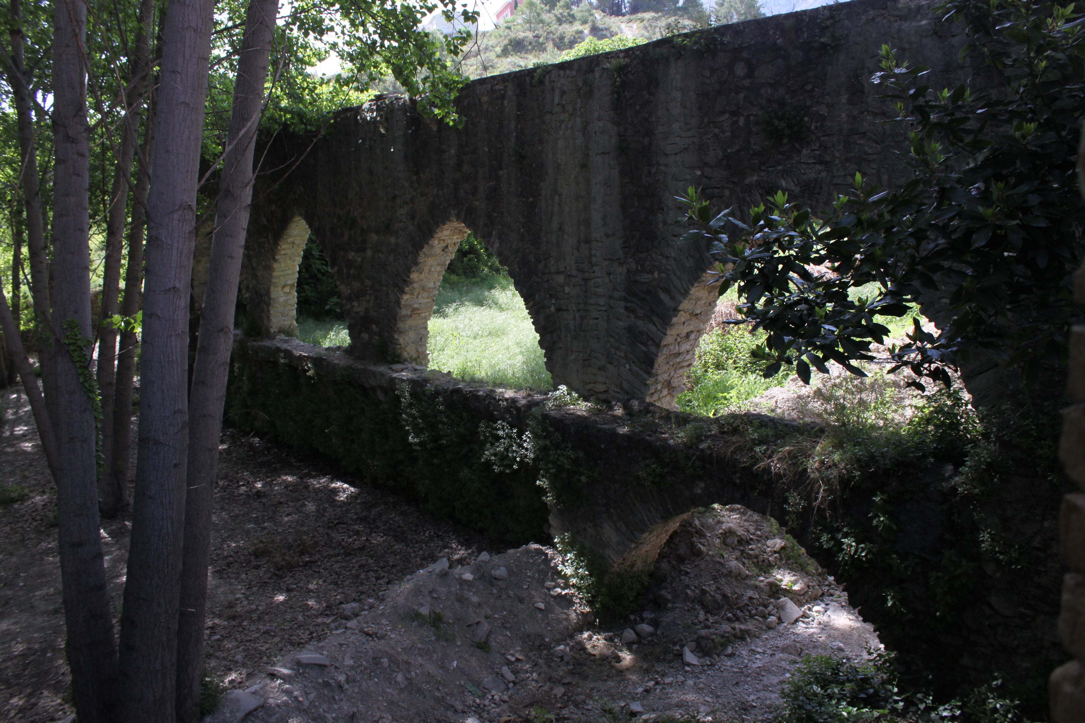 Acueducto árabe de Planes, Alicante, Comunidad Valenciana, España